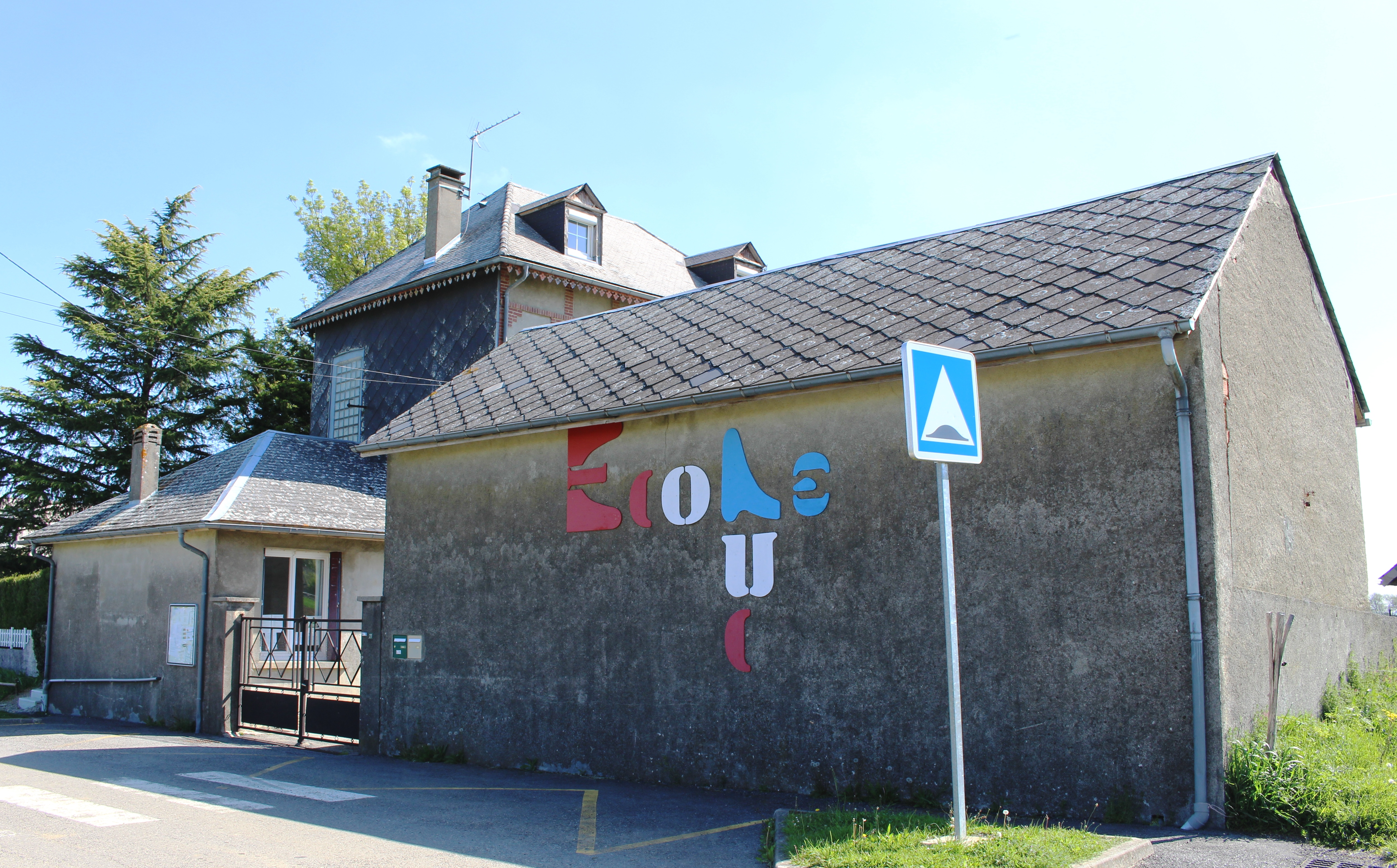 École de Luc (Hautes-Pyrénées)